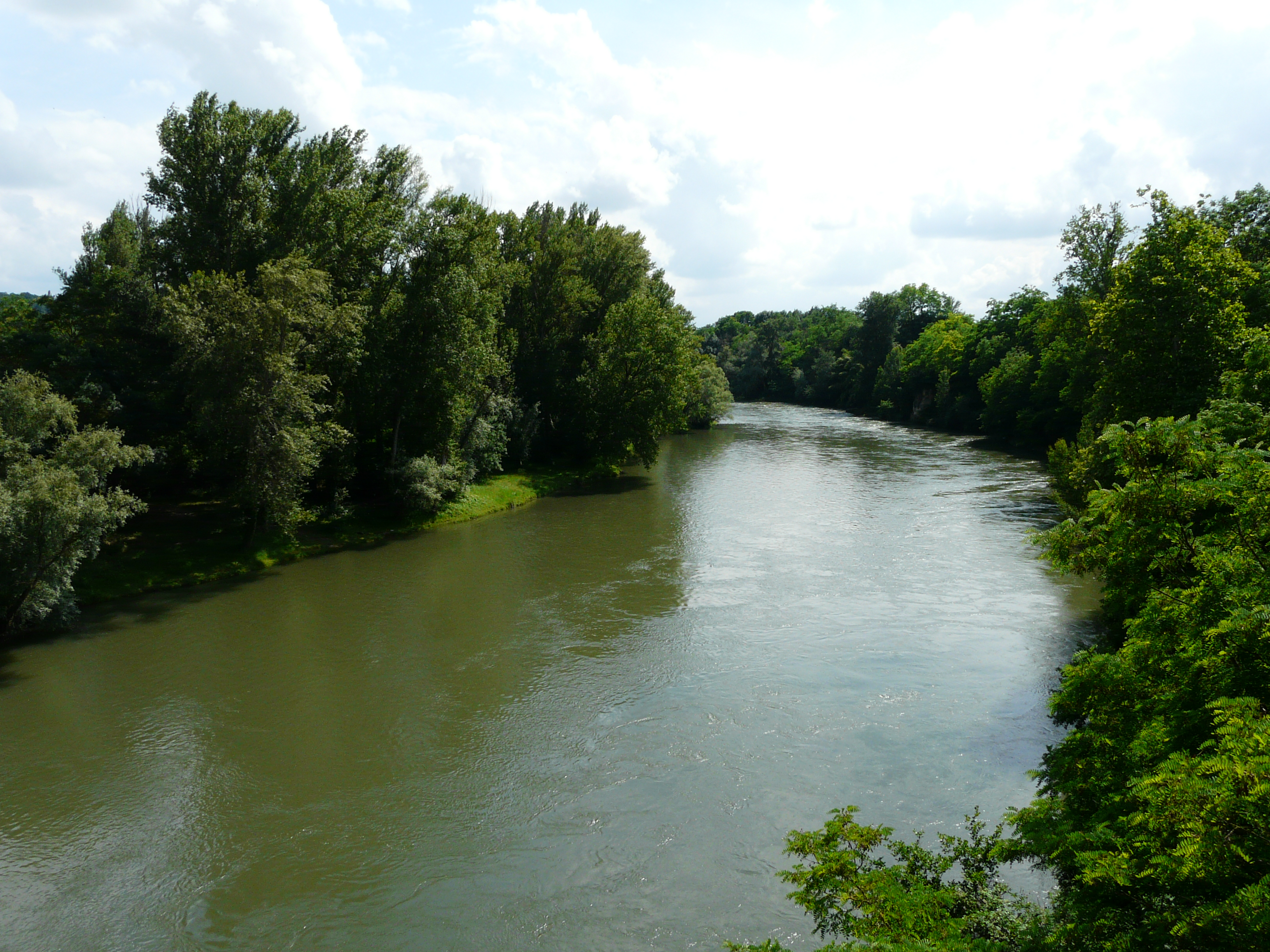 En amont du pont de la route départementale 25, la Garonne marque la limite entre les communes de Rieux-Volvestre (à gauche) et Saint-Julien-sur-Garonne (à droite), Haute-Garonne, France.